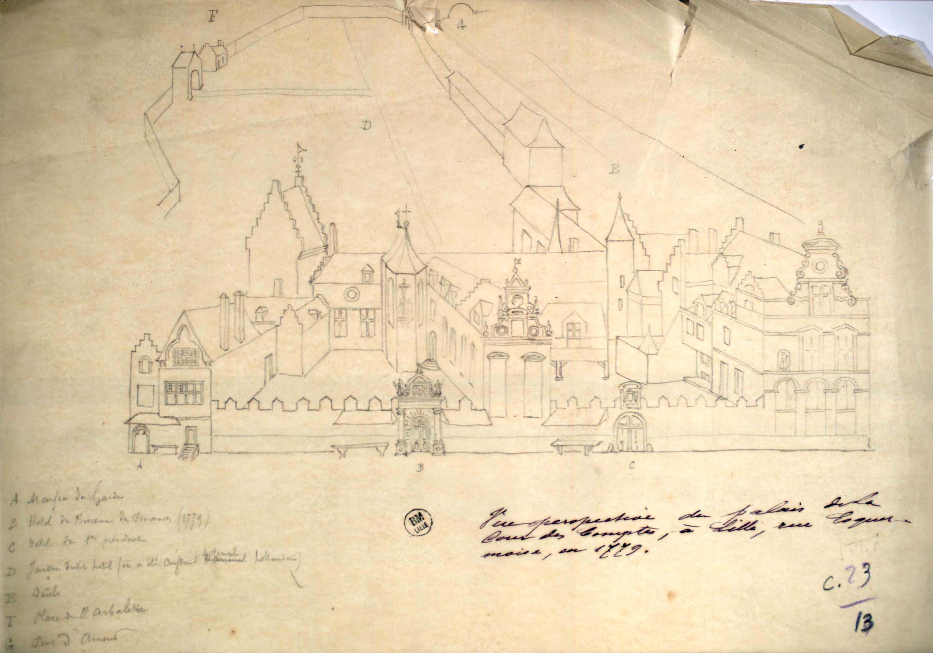 Pour le fichier recadré à utiliser dans les articles voir : Légende sur le documentA Maifon [maison] du GardeB Hotel du Bureau des Finances (1779)C Hotel du 1er ... [illisible]D Jardin dudit hotel (où a été conftruit [construit] le temple hollandais)E DeûleF Place de l'arbalèteG Pont d'amour